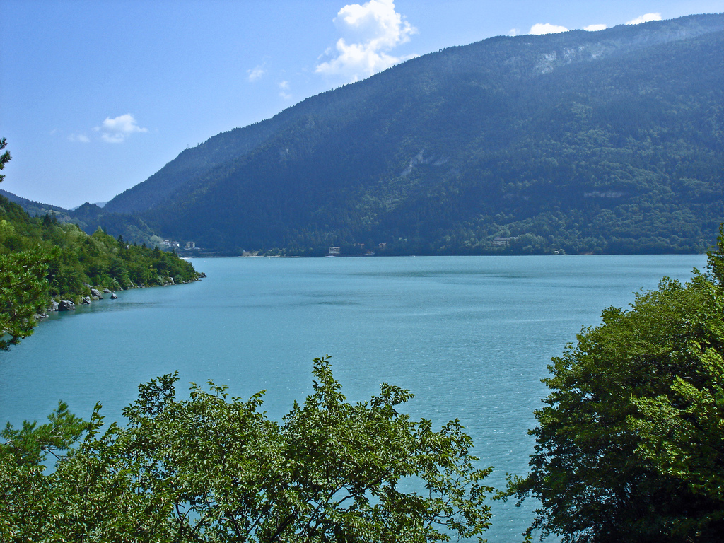 Lago Molveno: vista dai fortini di Napoleone